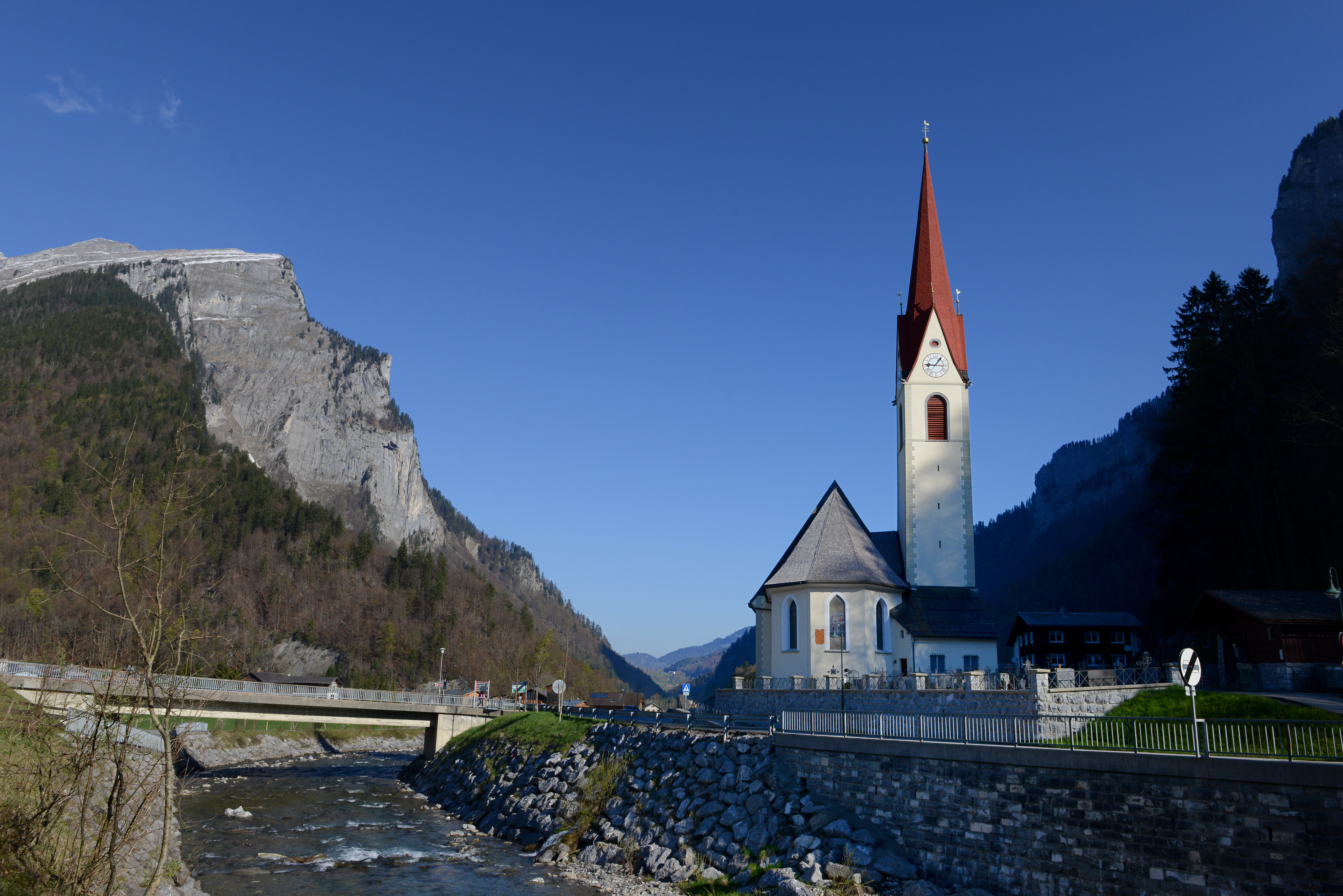 Pfarrkirche Hl. Leonhard in Au (Vorarlberg)